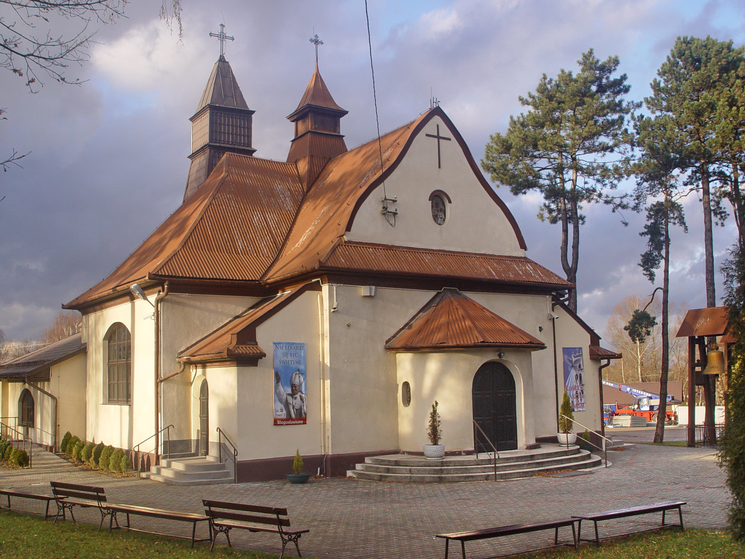 Kościół Matki Bożej Królowej Polski w Krakowie, ul. Zamiejska 6